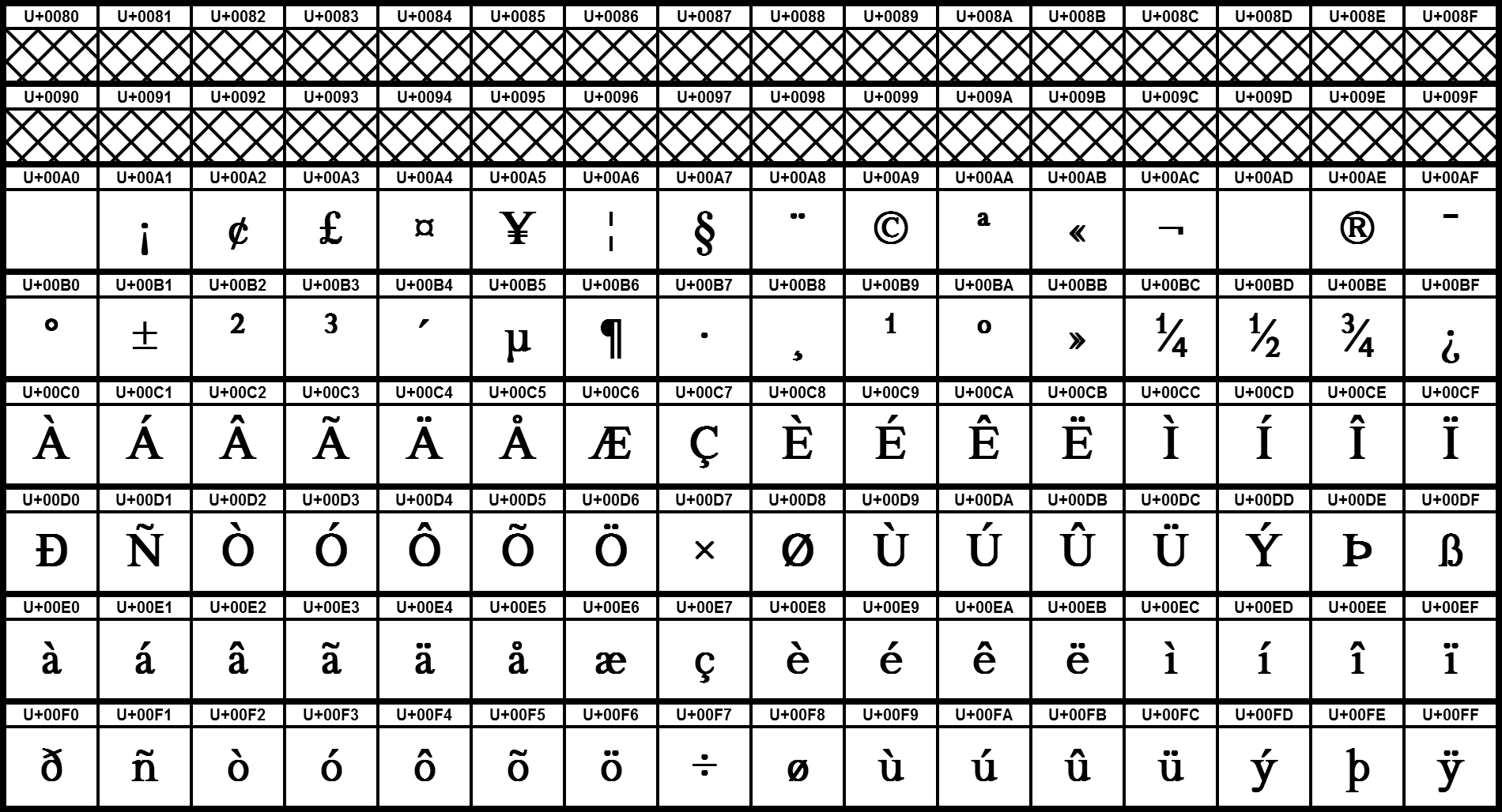 Grafiktafel für den Unicodeblock Lateinisch-1, Ergänzung. Doppelt schraffierte Felder sind Kontrollzeichen.